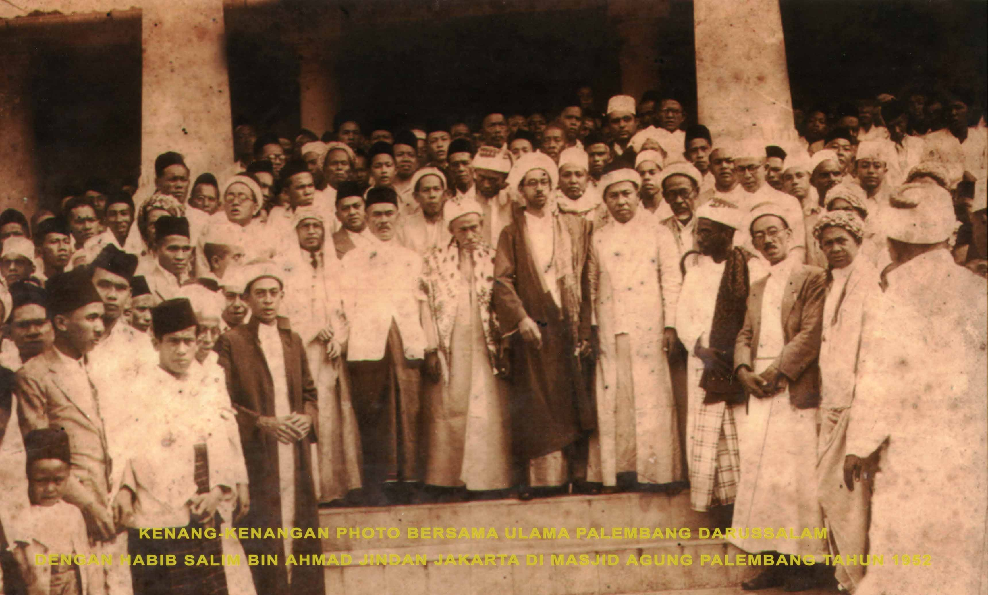 خروج الجماهير من مسجد أقون فلمبان